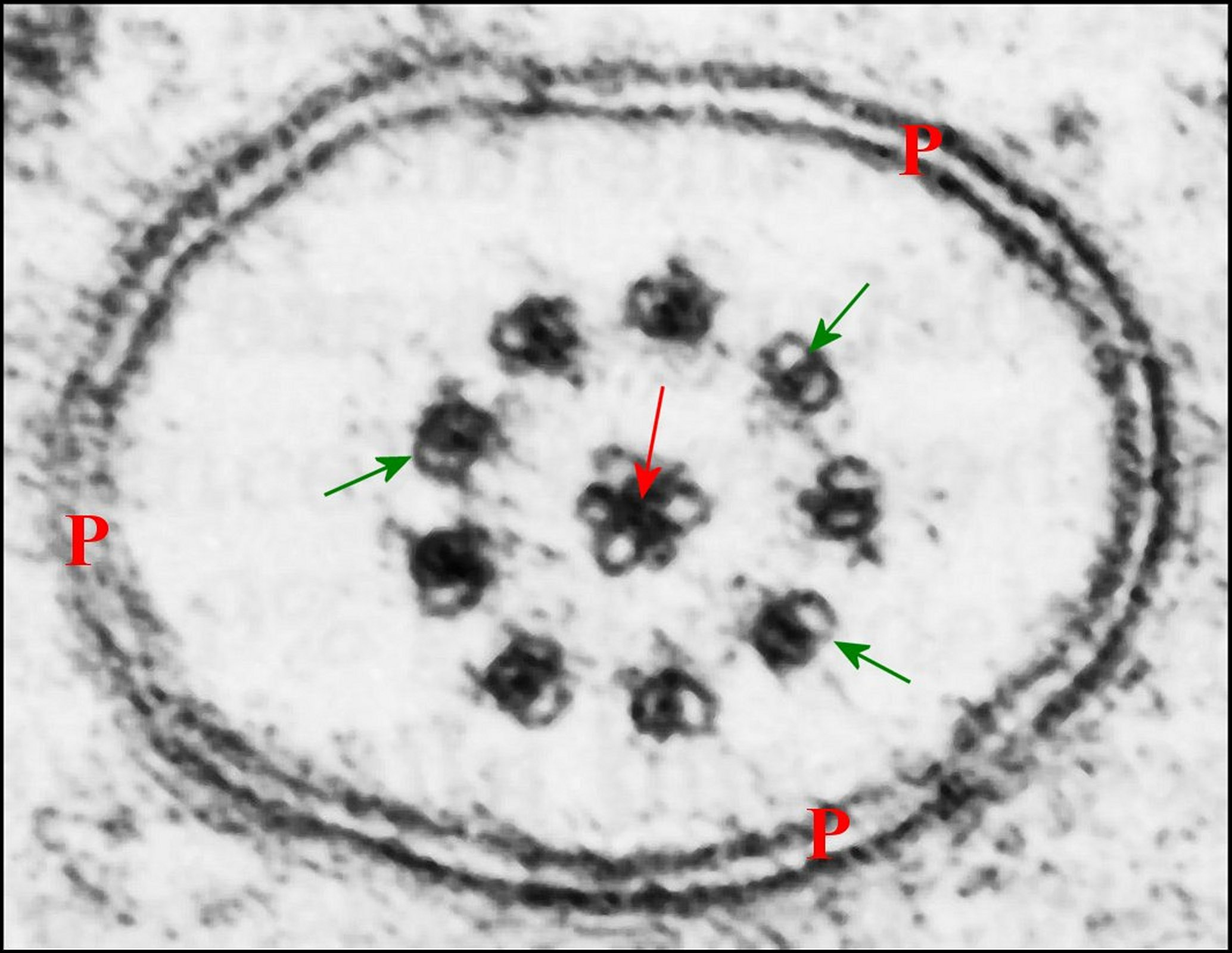 Flagelle de spermatozoïde d' Araignée en coupe transversale vue au microscope électronique à transmission.